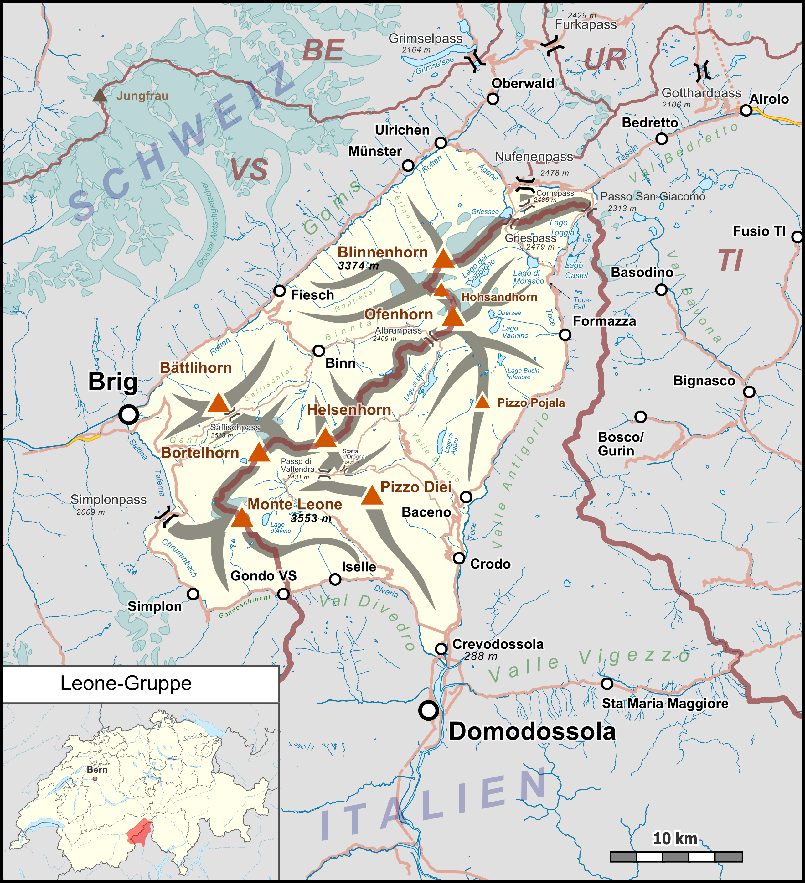 Lagekarte der Leone-Gruppe